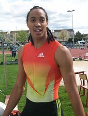 Photo de l'athlète Pascal Martinot-Lagarde